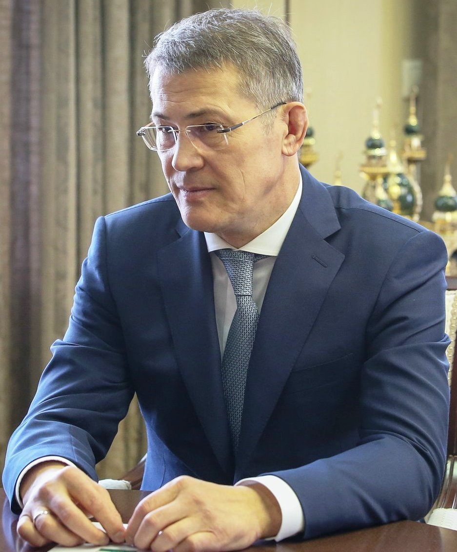 Радий Фаритович Хабиров (род.1964) — российский политический и государственный деятель